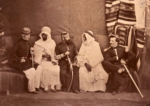 Officiers des affaires arabes et notables musulmans, Oran, 1856. De gauche à droite : M. Gabeau, interprète auxiliaire de 1e classe à la direction arabe ; El Hadj Mustapha, fils de l'ancien agha Mazary ; lieutenant Couté, chef du bureau arabe d'Oran ; El Arbi ben Youssef, ex-agha de Saïda ; lieutenant Becquet, détaché au bureau arabe d'Oran.